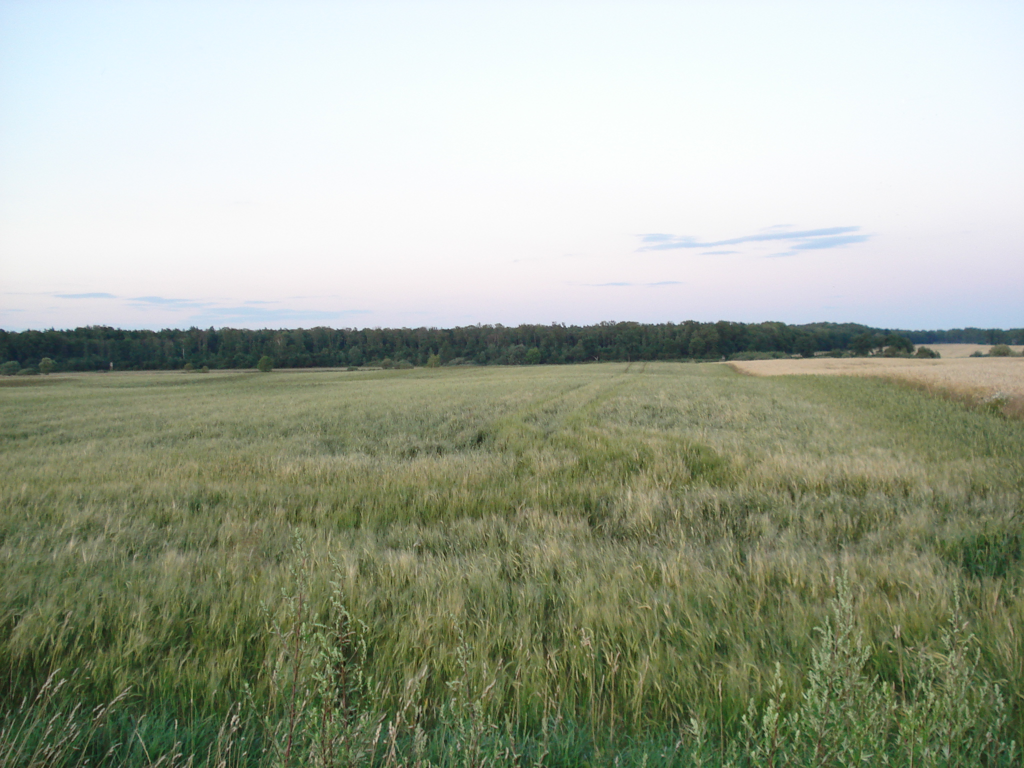 Przyroda